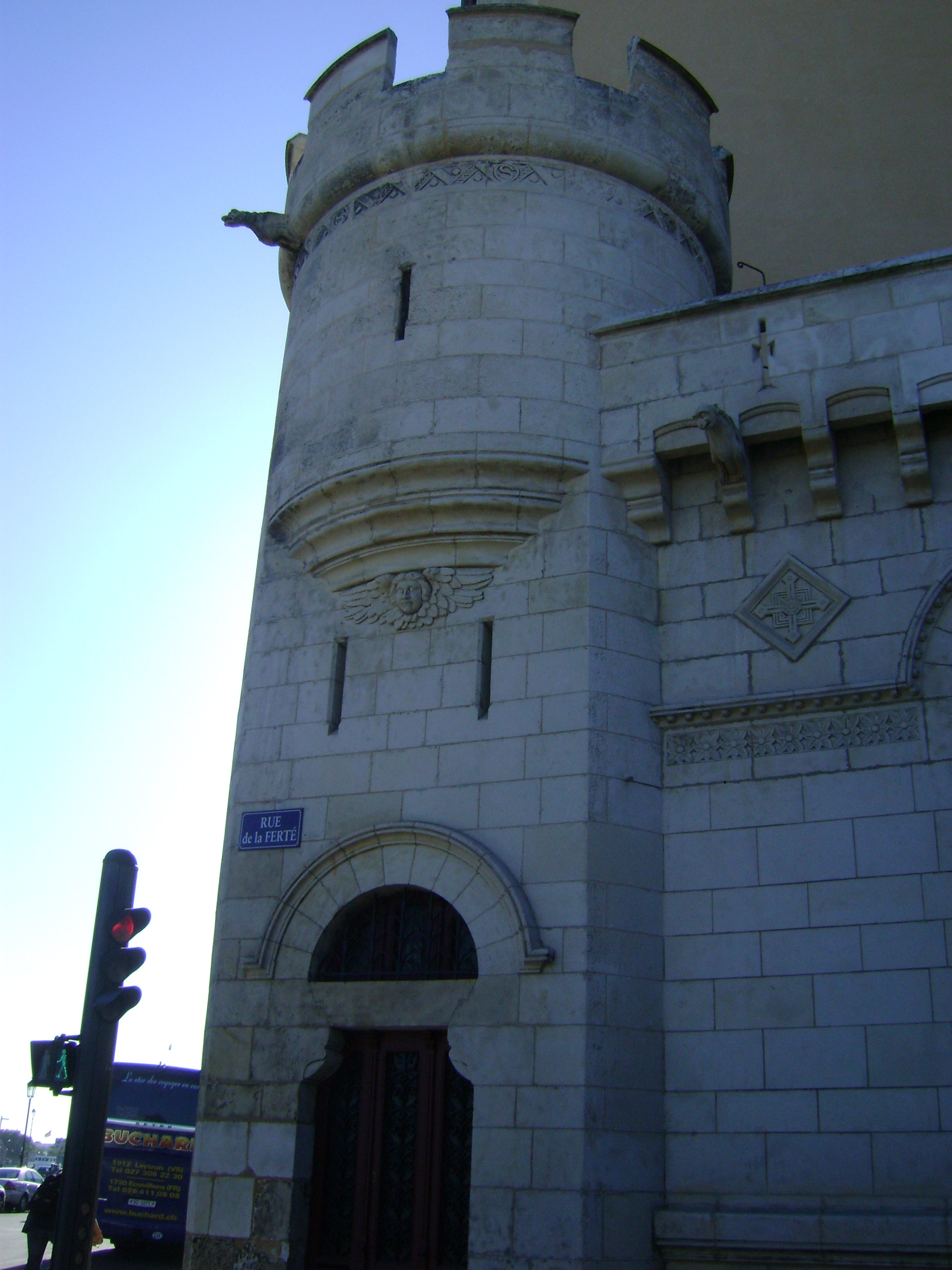 Eglise Saint-Sauveur de la Rochelle.